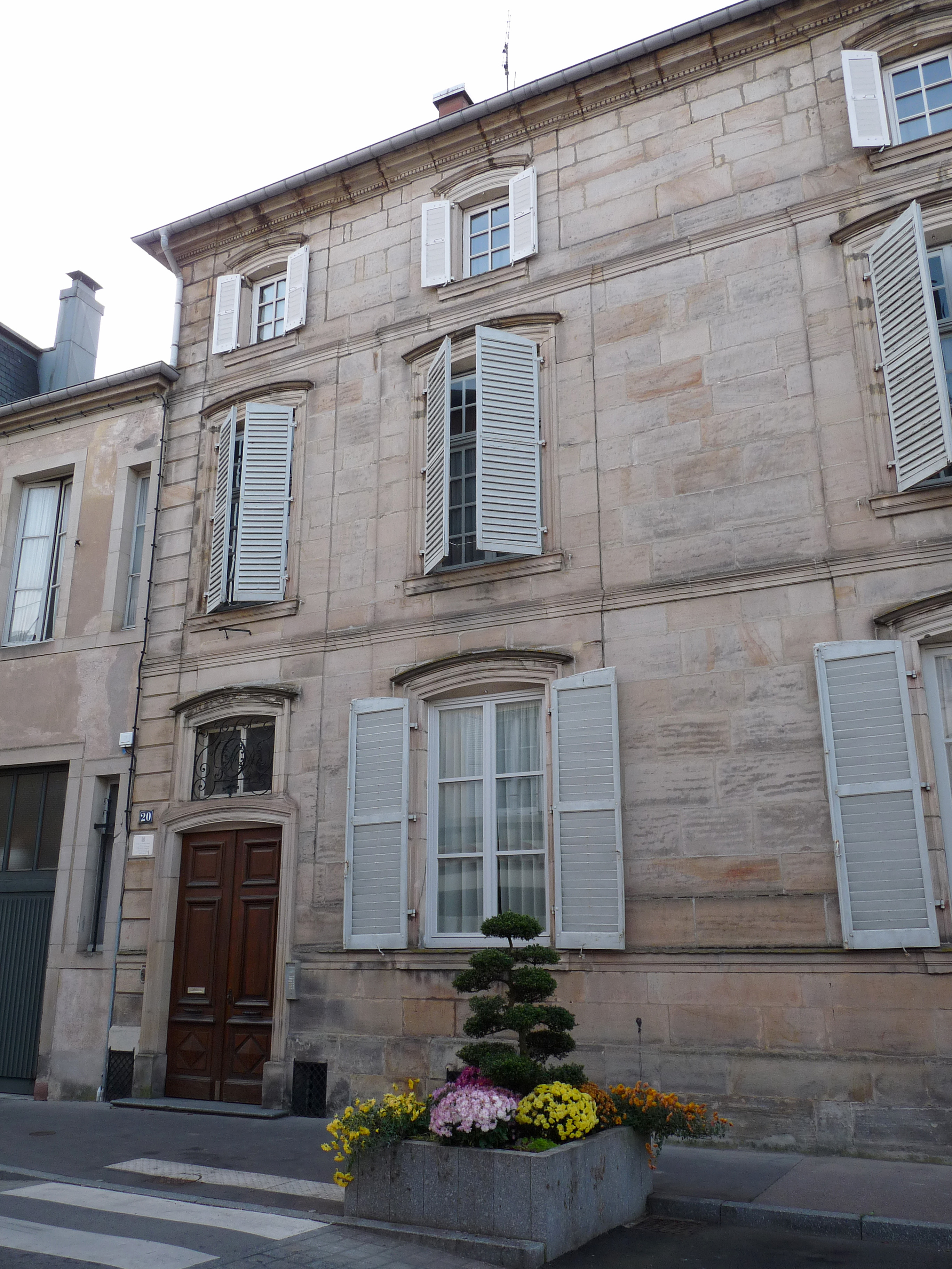 Remiremont : N° 20. Maison du chanoine Andreu (1686-1748), ancien curé de Remiremont, directeur de l'hôpital, bibliothécaire et écolâtre du chapitre. XVIIIe siècle